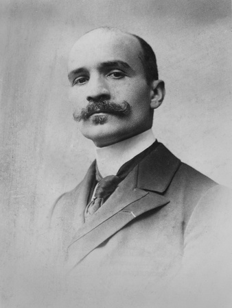 Жорж Морис Палеолог (Georges Maurice Paléologue, 1859—1944) — французский политик, дипломат